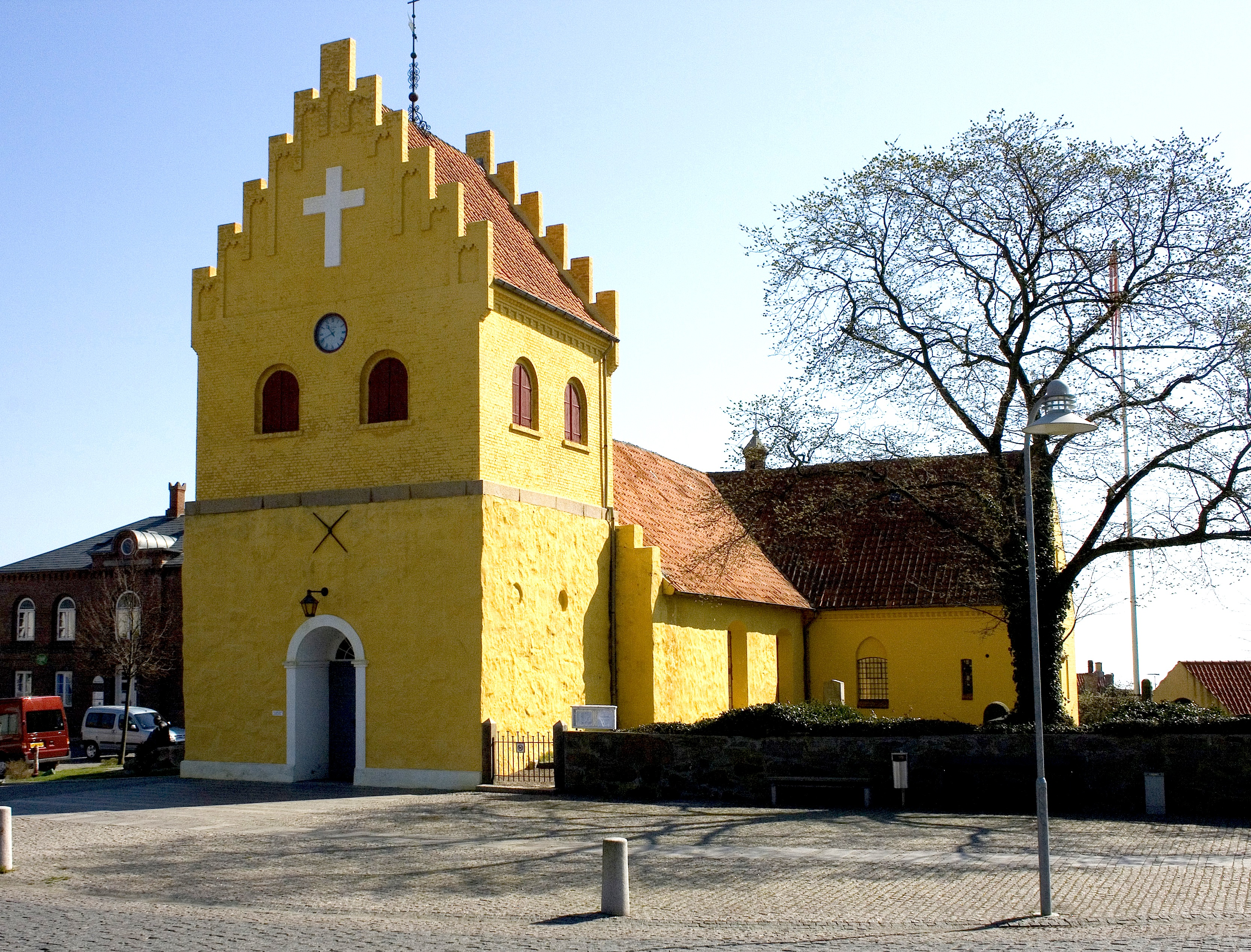 Allinge kirke